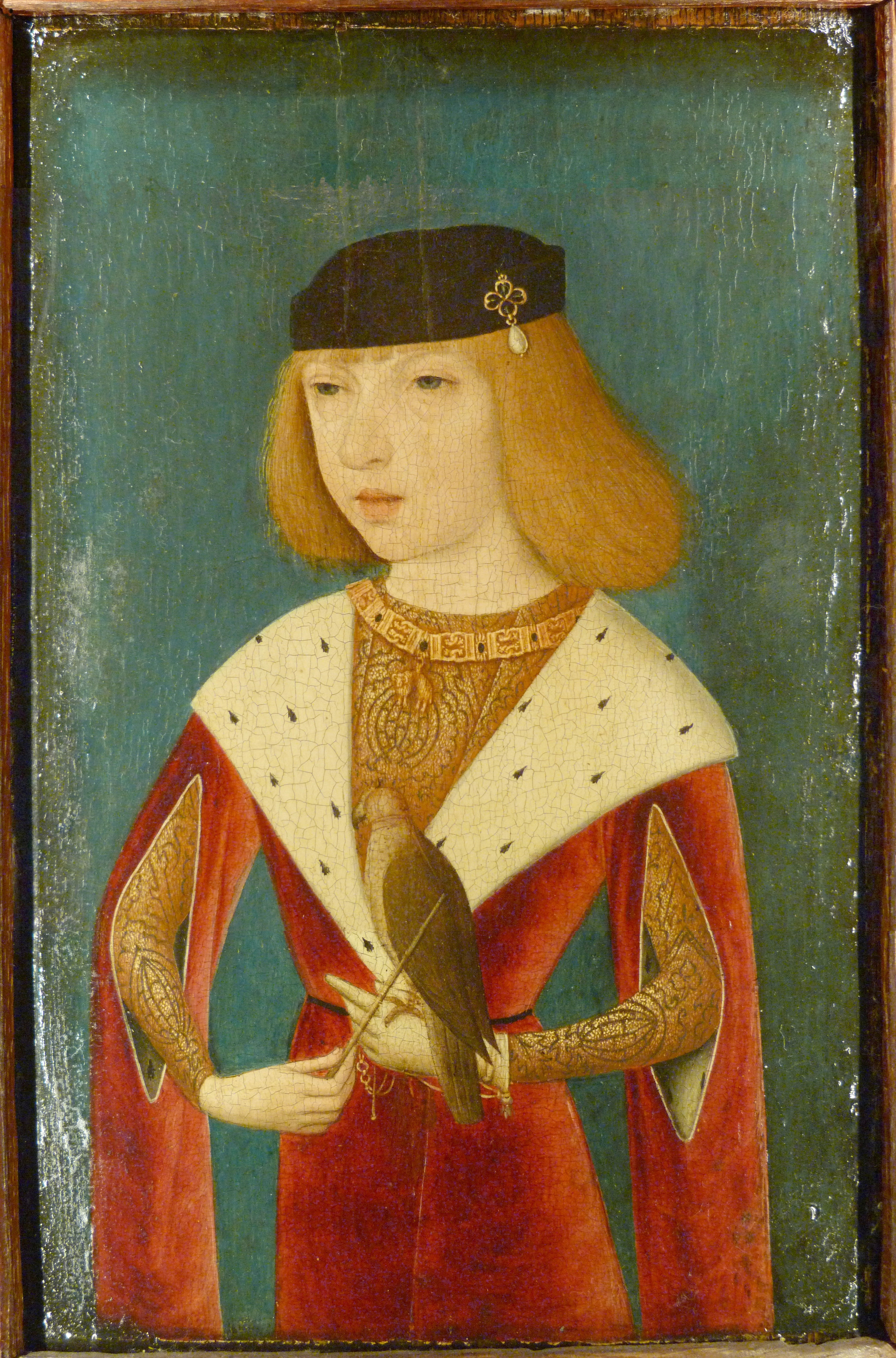 Philippe le Beau (1478-1506) tenant un faucon, (Restitution par assemblage de 3 clichés).